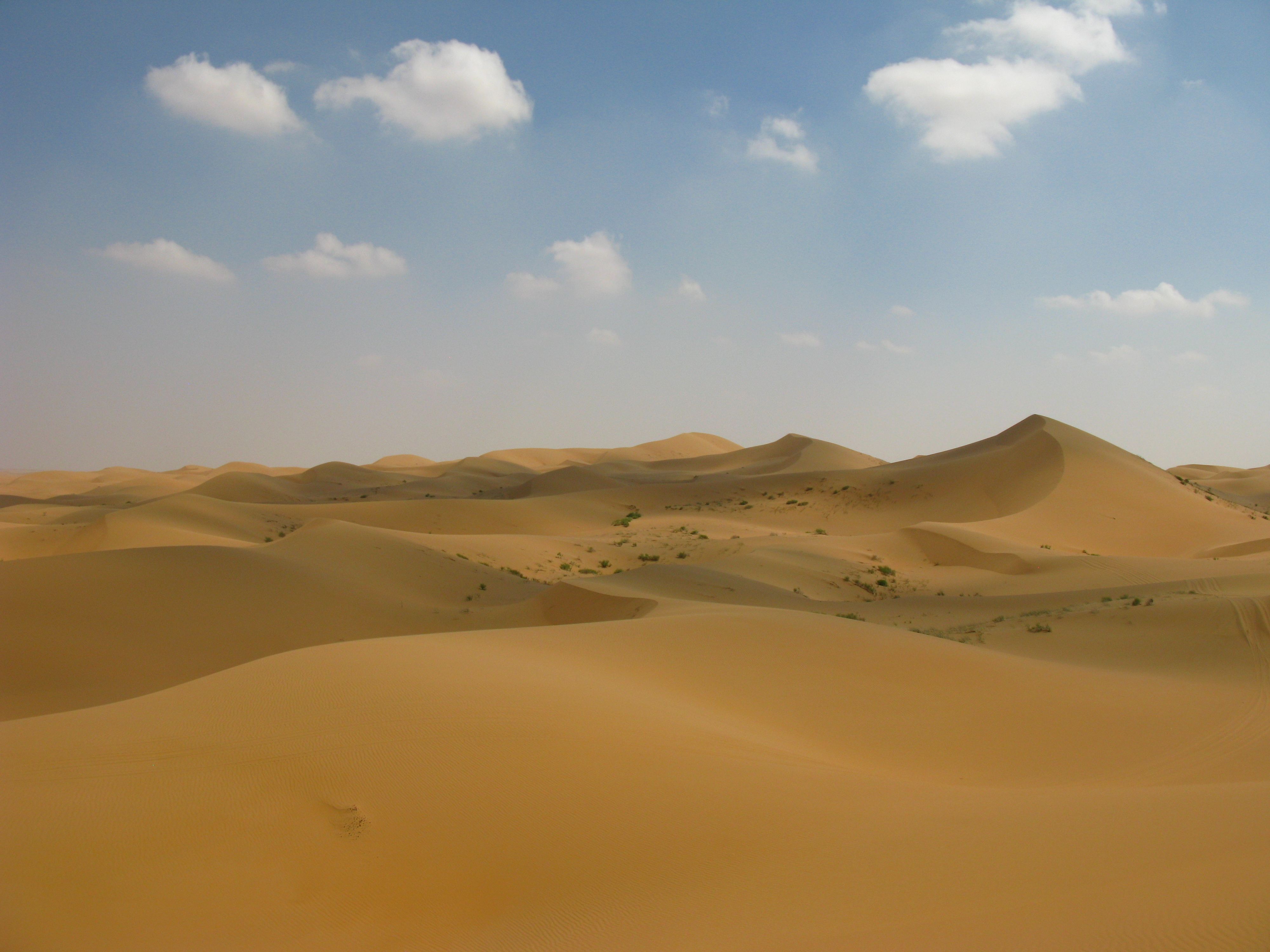 Time for desert